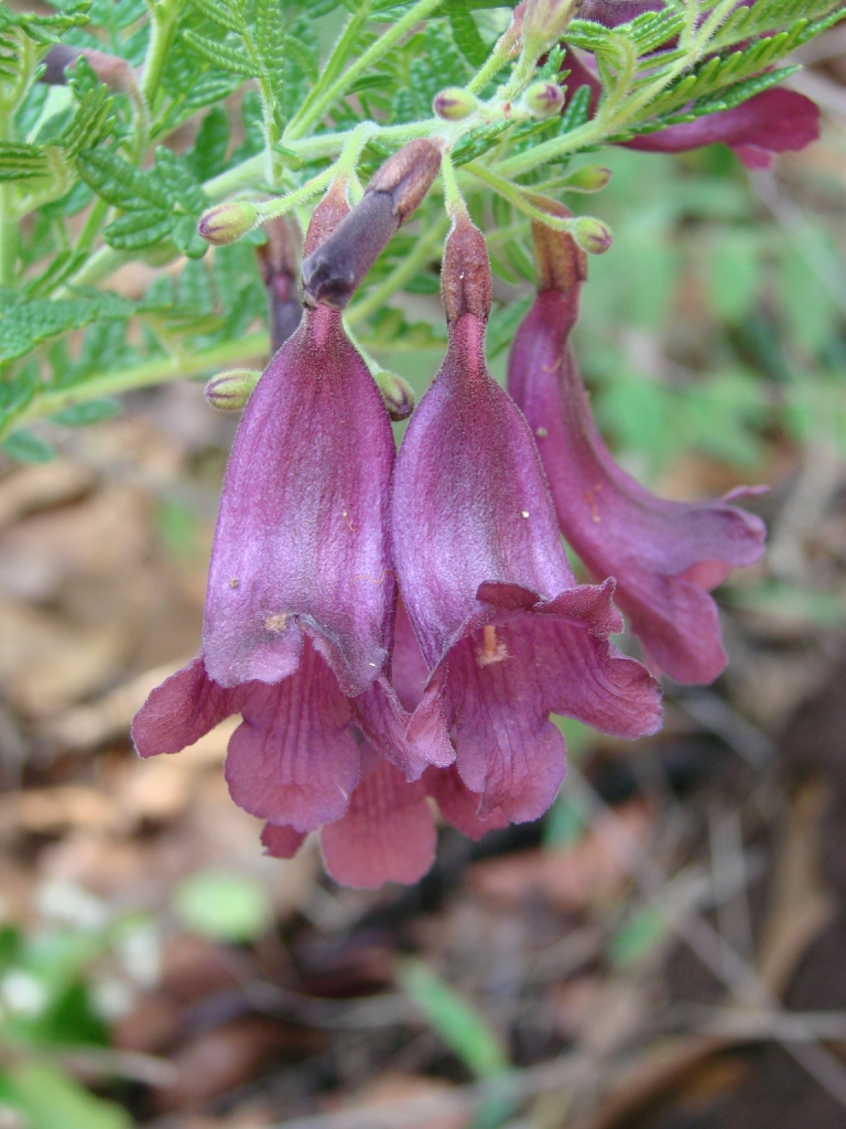 Jacaranda ulei (= Jacaranda crystallana) - BIGNONIACEAE Jardim Botânico de Brasília - Distrito Federal - Brasil.